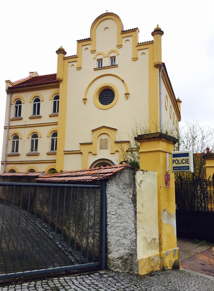 Synagoga ve Slaném, stav duben 2017